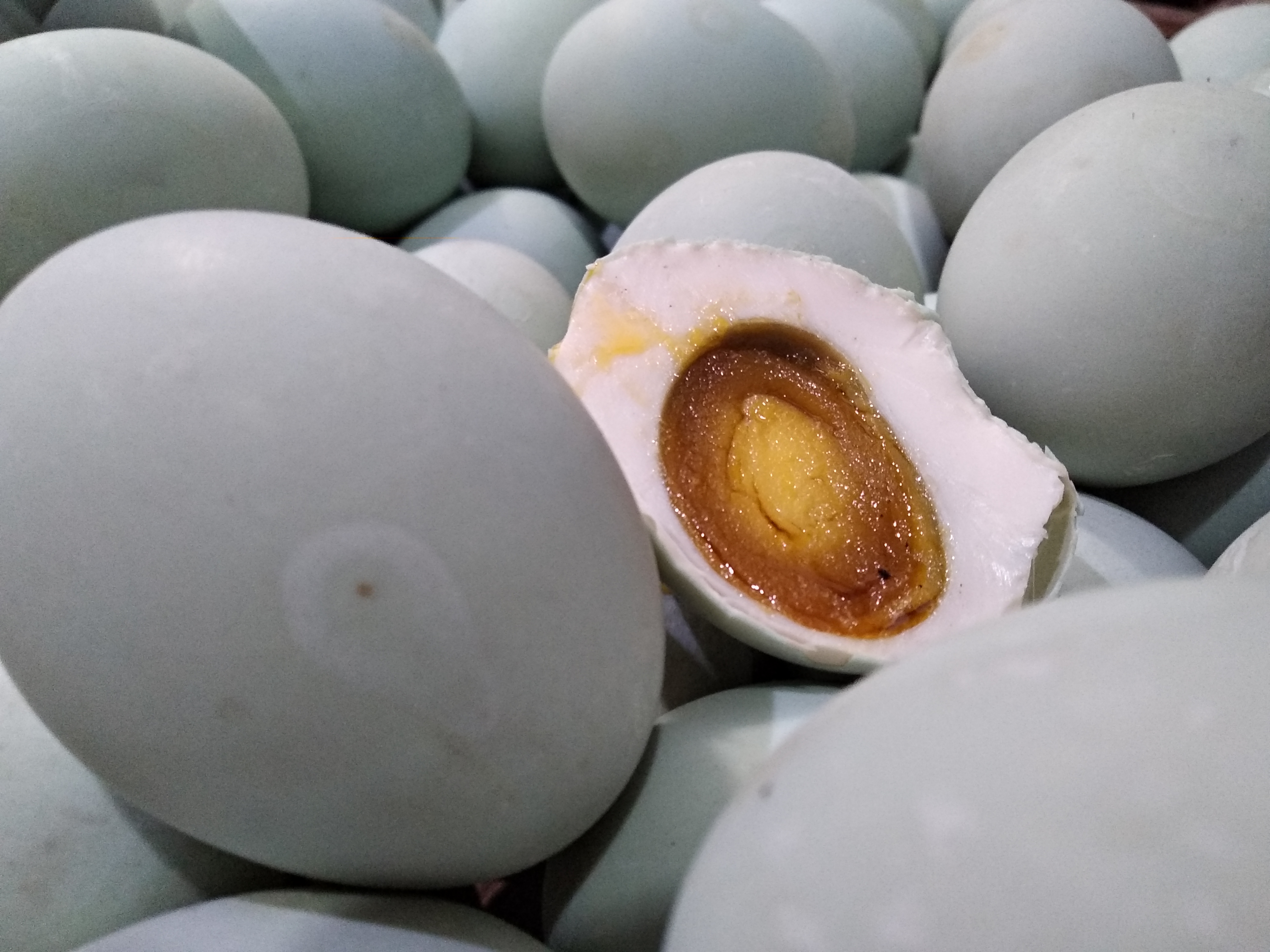 Basa Jawa: Endhog Asin khas Losari, Brebes.